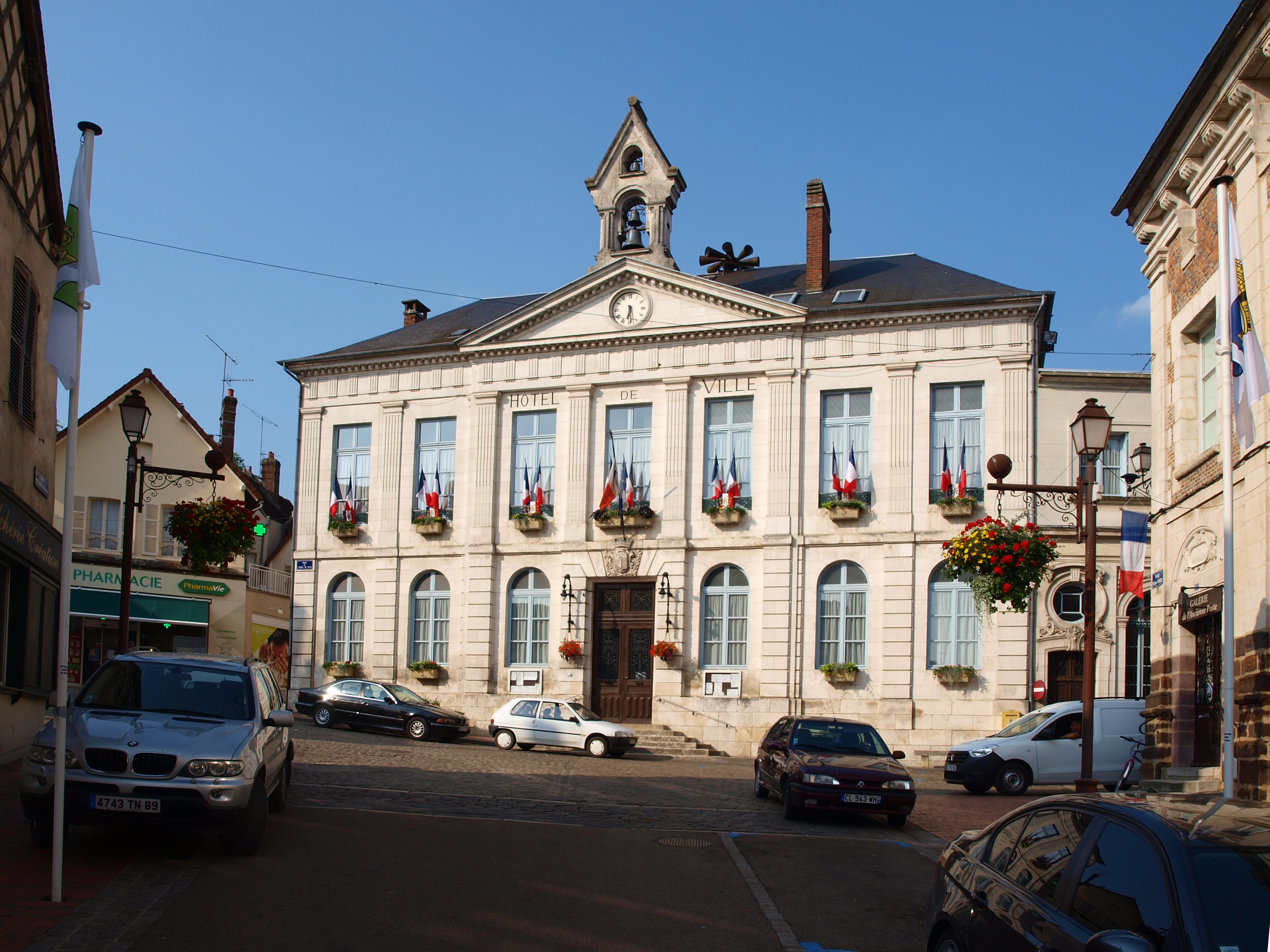 Toucy (Yonne, France) ; la mairie.